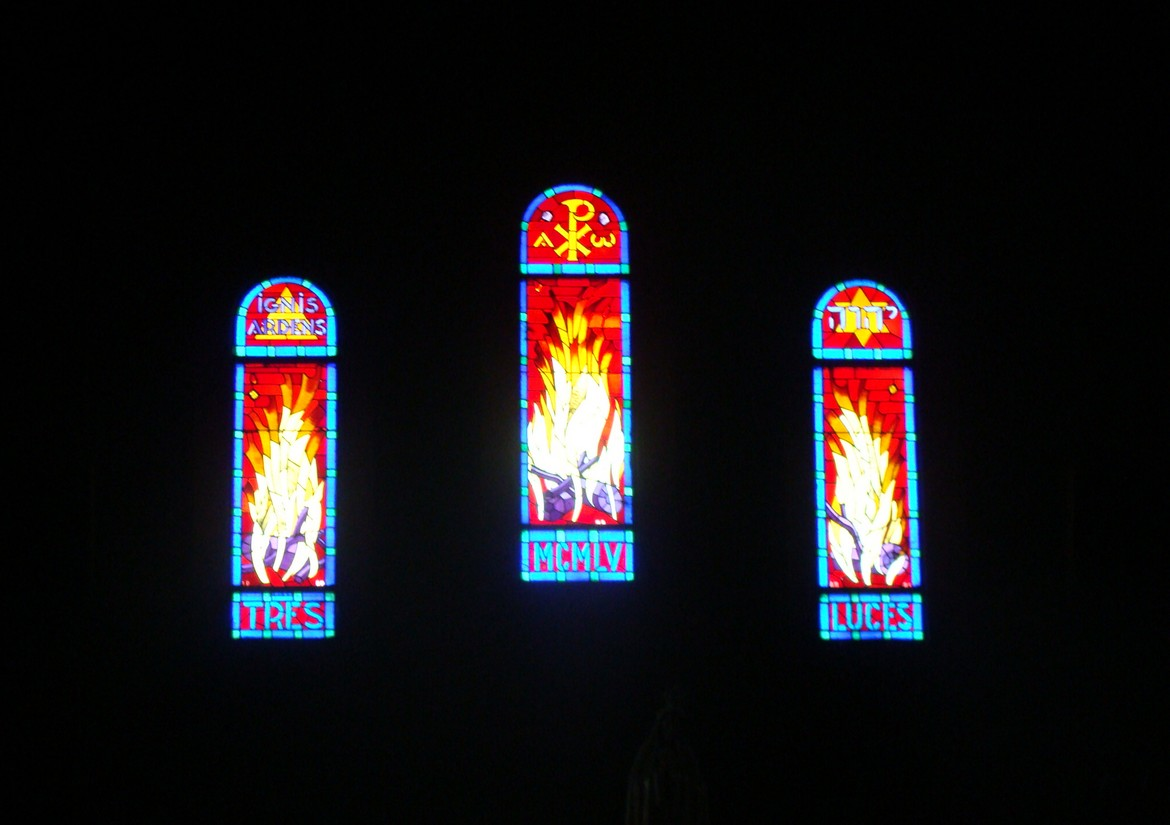 Église Sainte-Rita de Marseille : vitraux au-dessus de l'entrée. Sous-titrés "TRES LUCES" (trois lumières, origine du nom des Trois-Lucs, où se trouve l'église); en haut de celui de gauche, "IGNIS ARDENS" (feux vif).